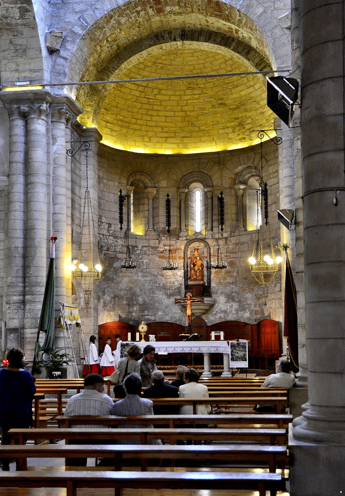 Iglesia de Santa Maria la Mayor de Tamarite de Litera (Huesca)